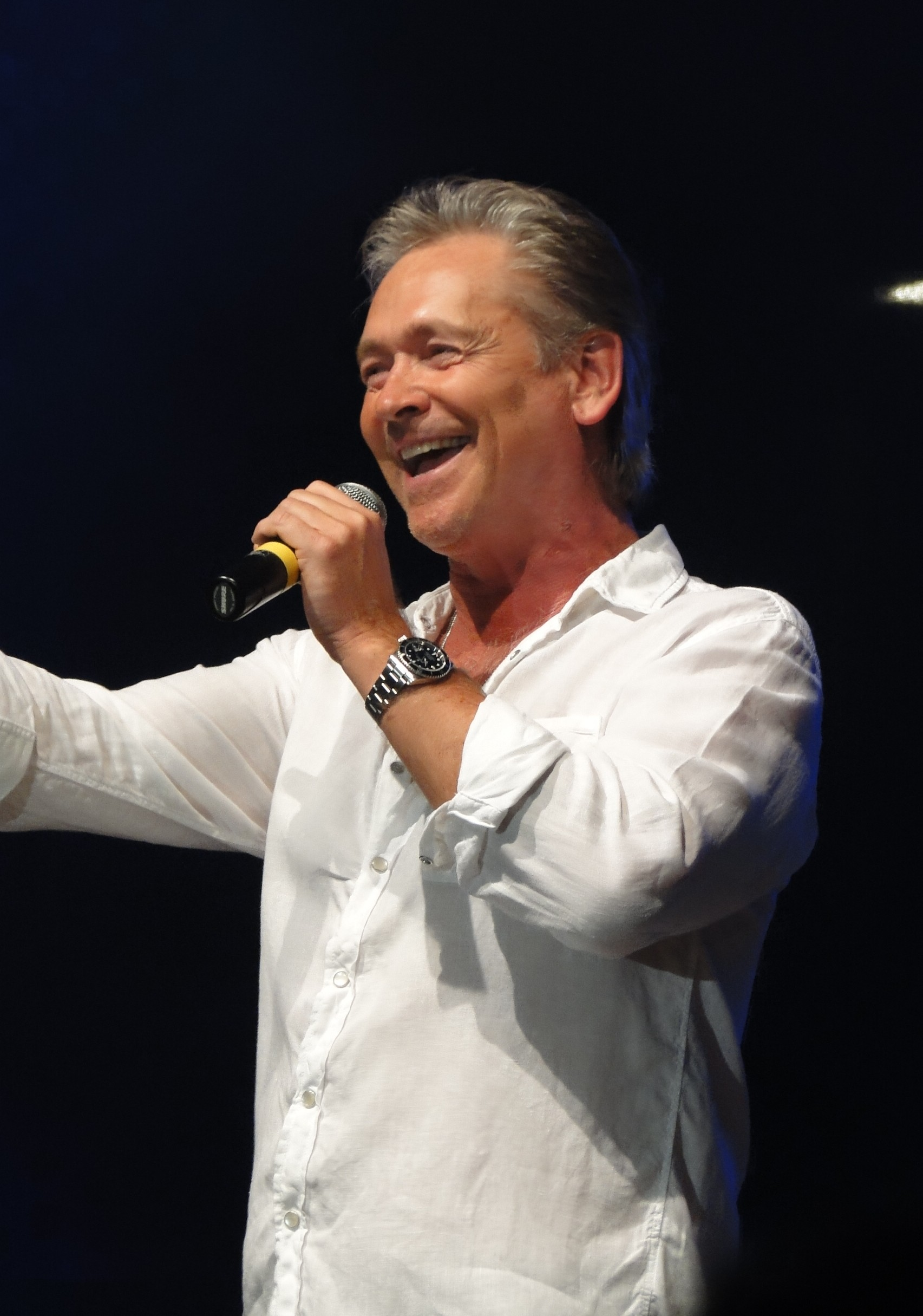 Olaf Berger 2012